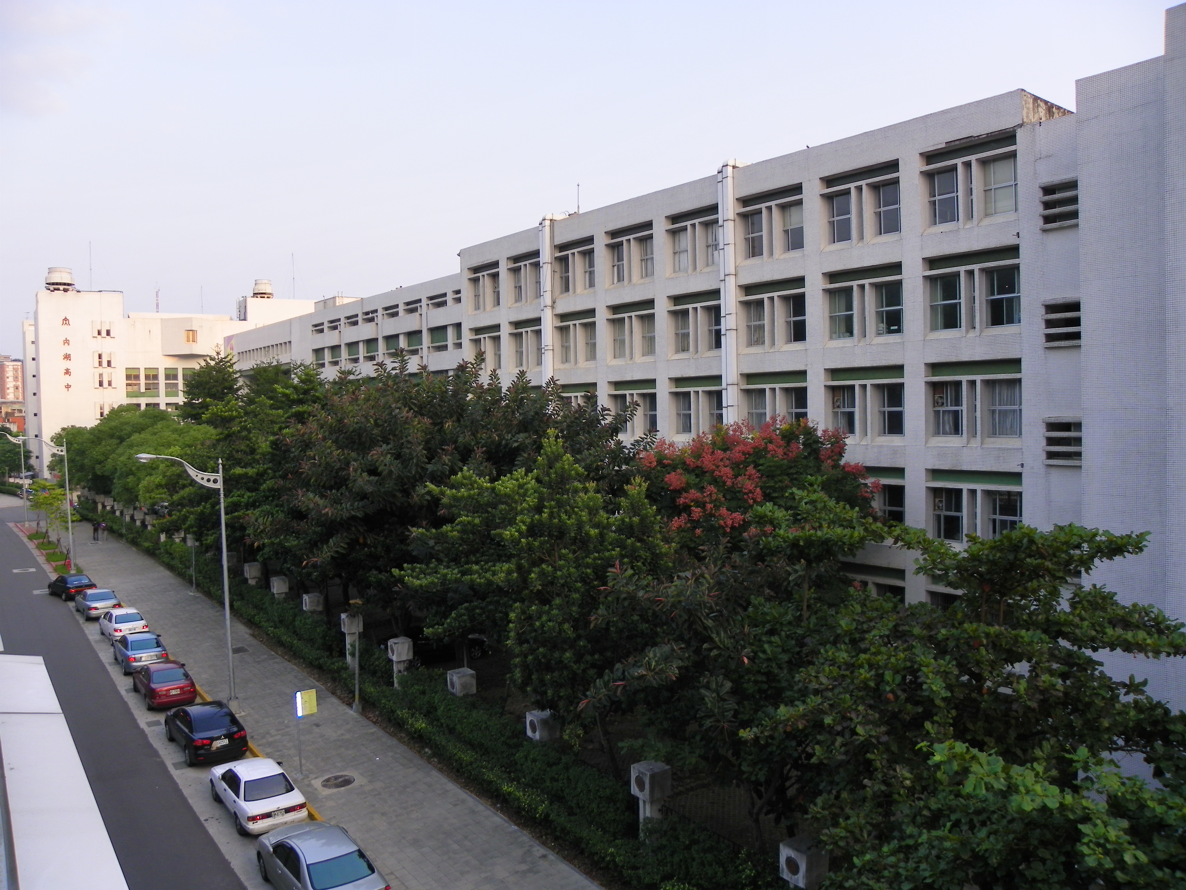 台北市立内湖高級中学。